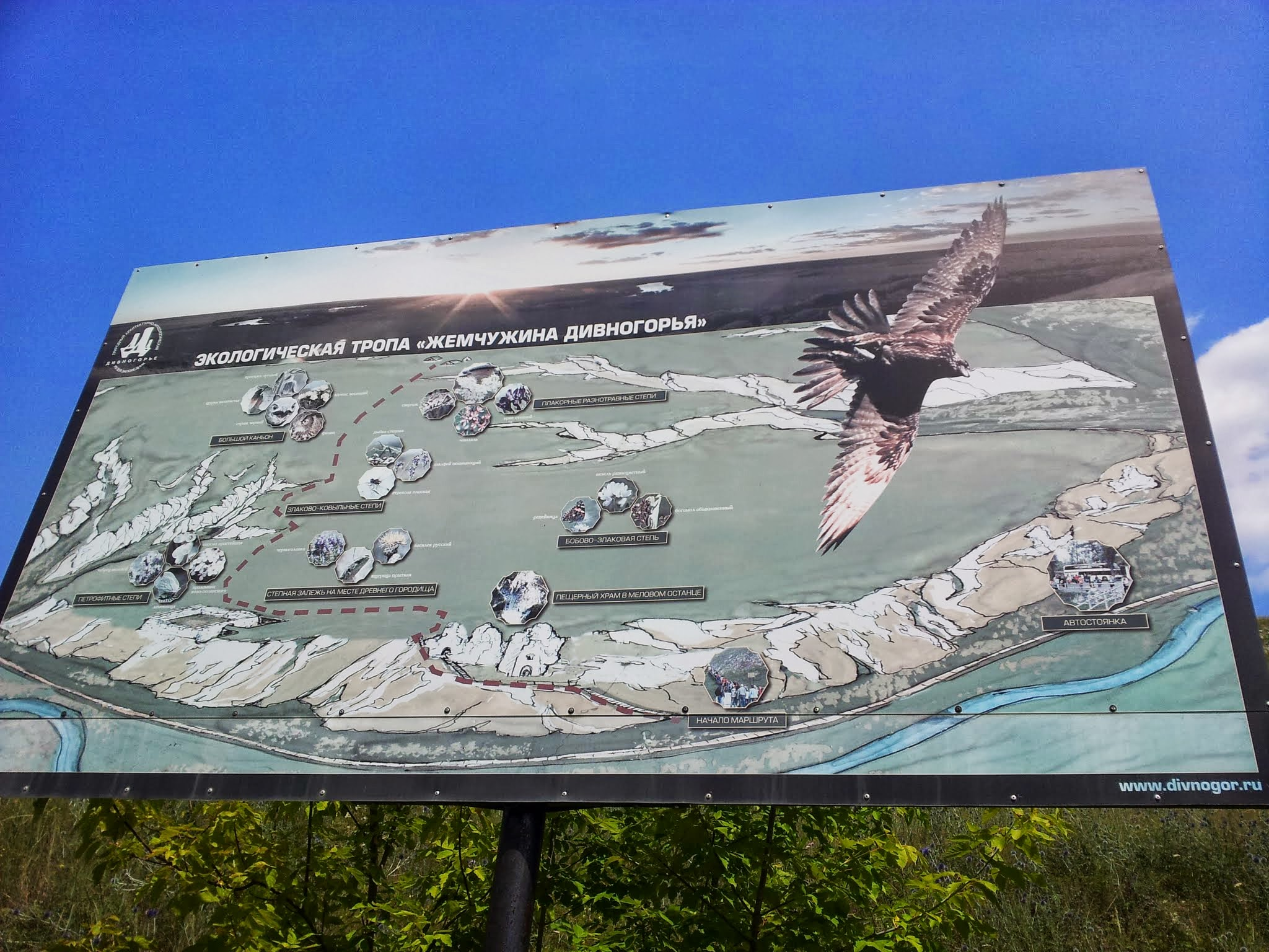 Divnogorye, Voronezhskaya oblast', Russia, 397970